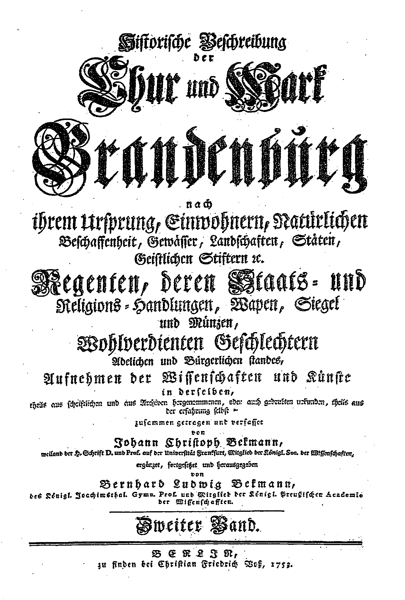 Titelblatt des Buchs "Historische Beschreibung der Chur und Mark Brandenburg" von Bekmann 1753